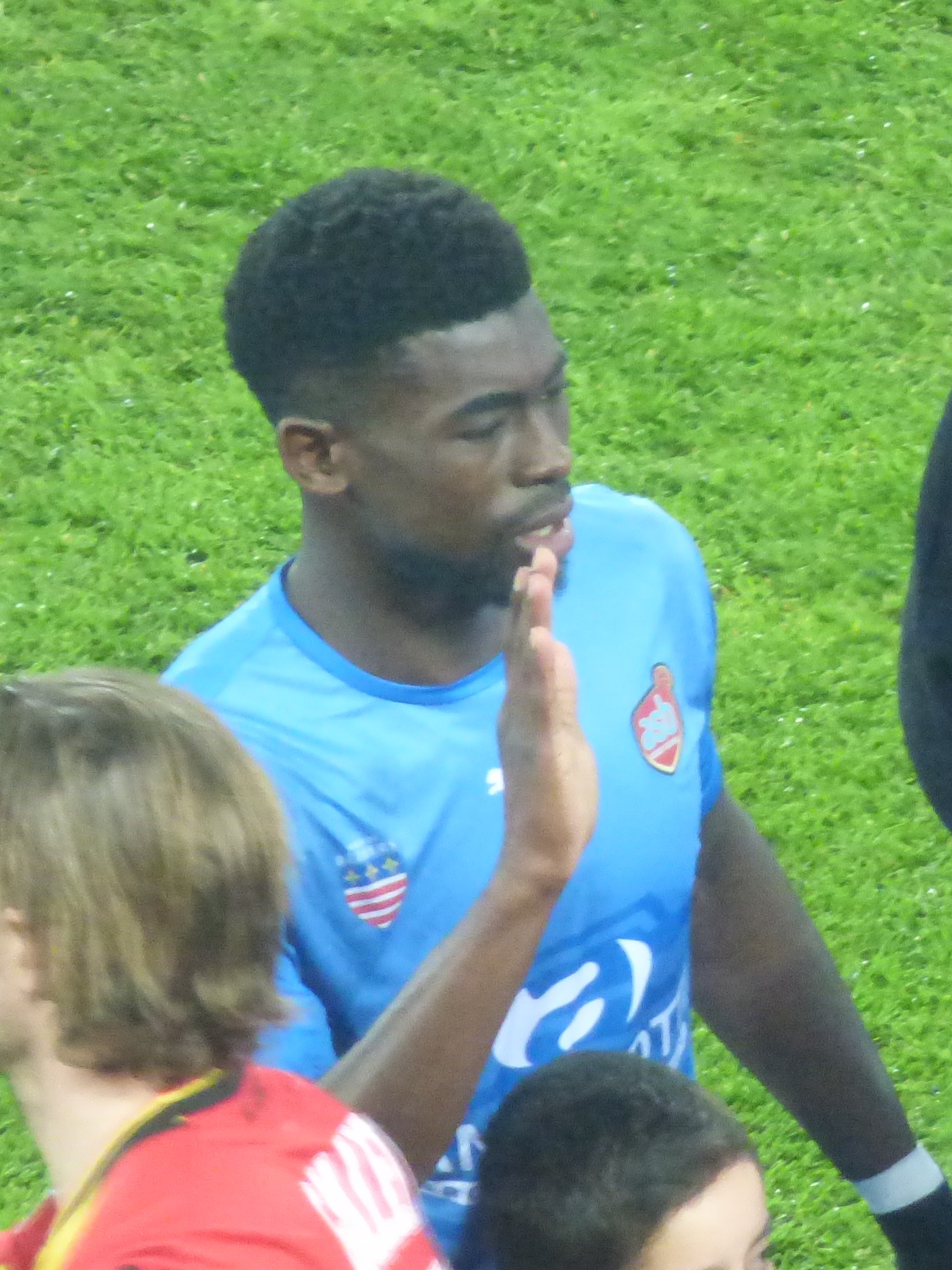 Simon Gbegnon avant le match RC Lens / AS Béziers, comptant pour la 23ème journée du championnat de France de football de Ligue 2 2018-2019, le 4 février 2019, au Stade Bollaert-Delelis.